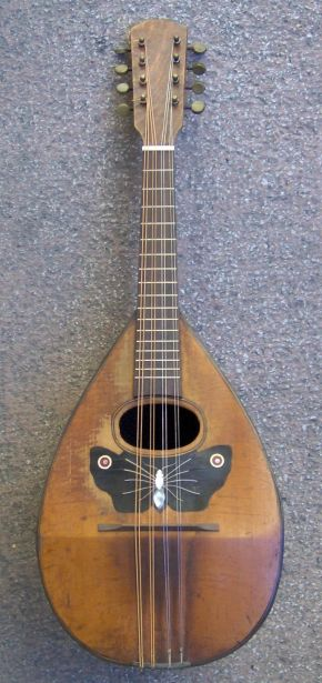 Mandolin